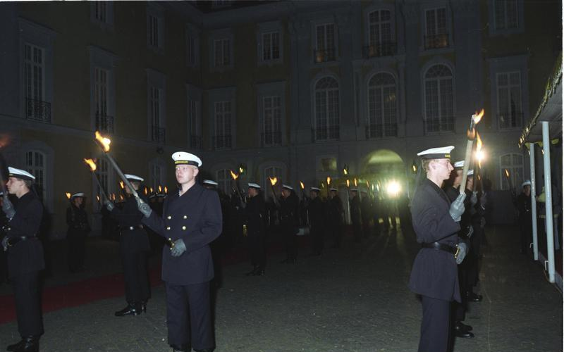 Besuch von Königin Elisabeth II.